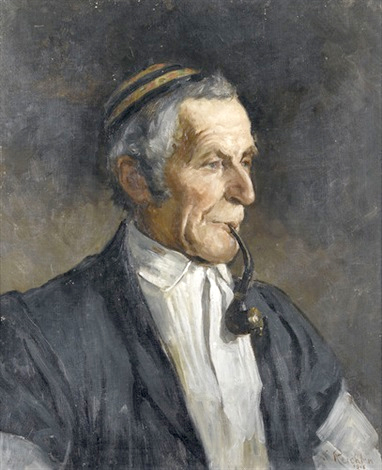 Bildnis des Bauern Pipoz aus Charmey mit Pfeifchen